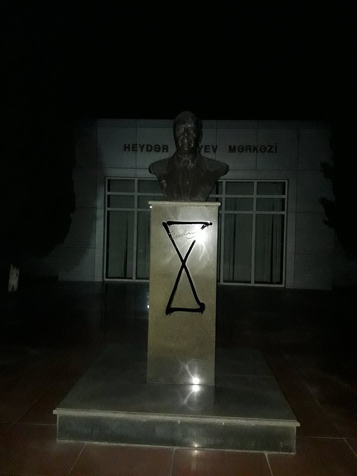 Qum Saatı Büstü Heydər Əliyev